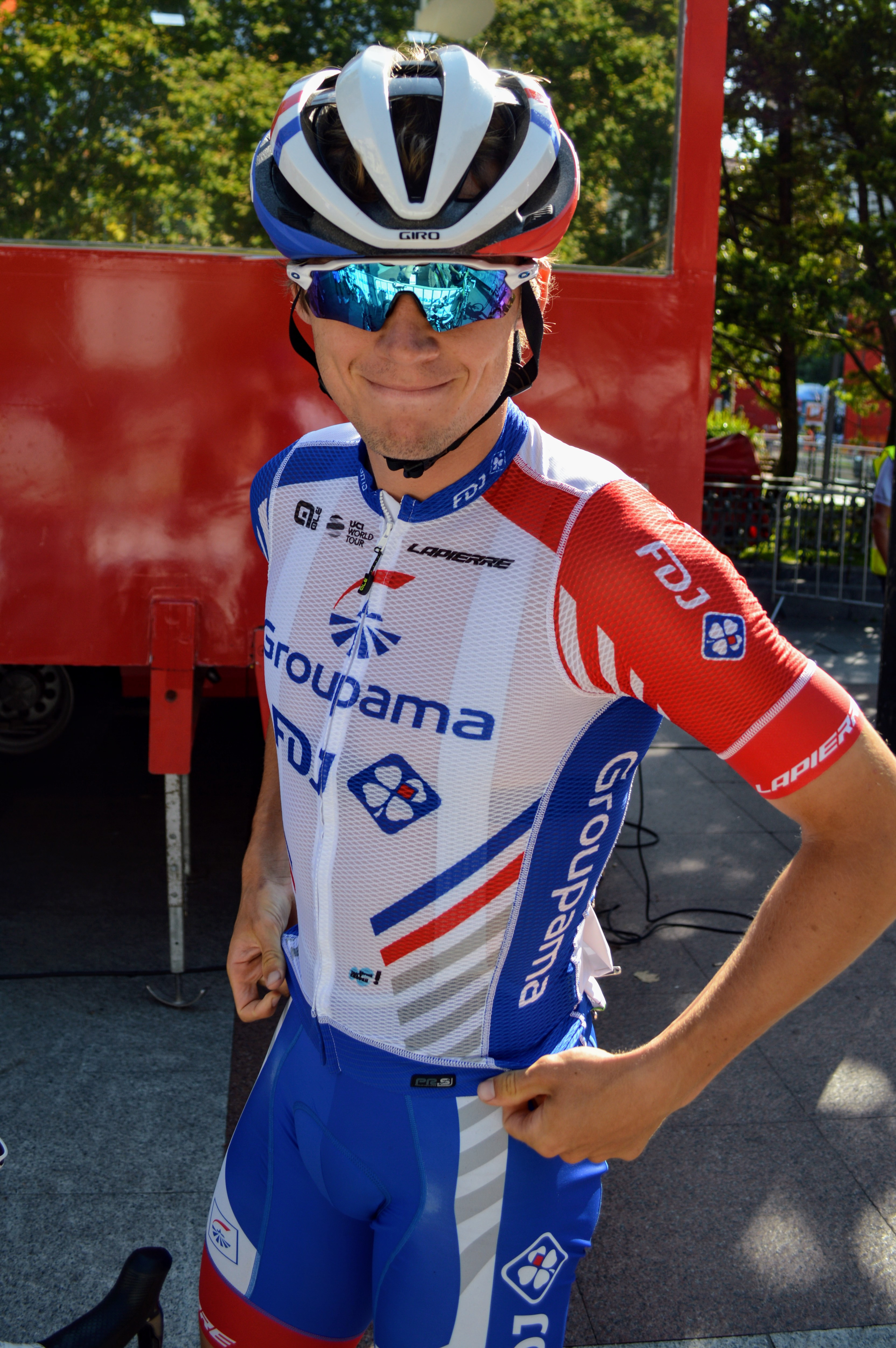 Valentin MADOUAS - Août 2019 (Clasica San Sebastian)